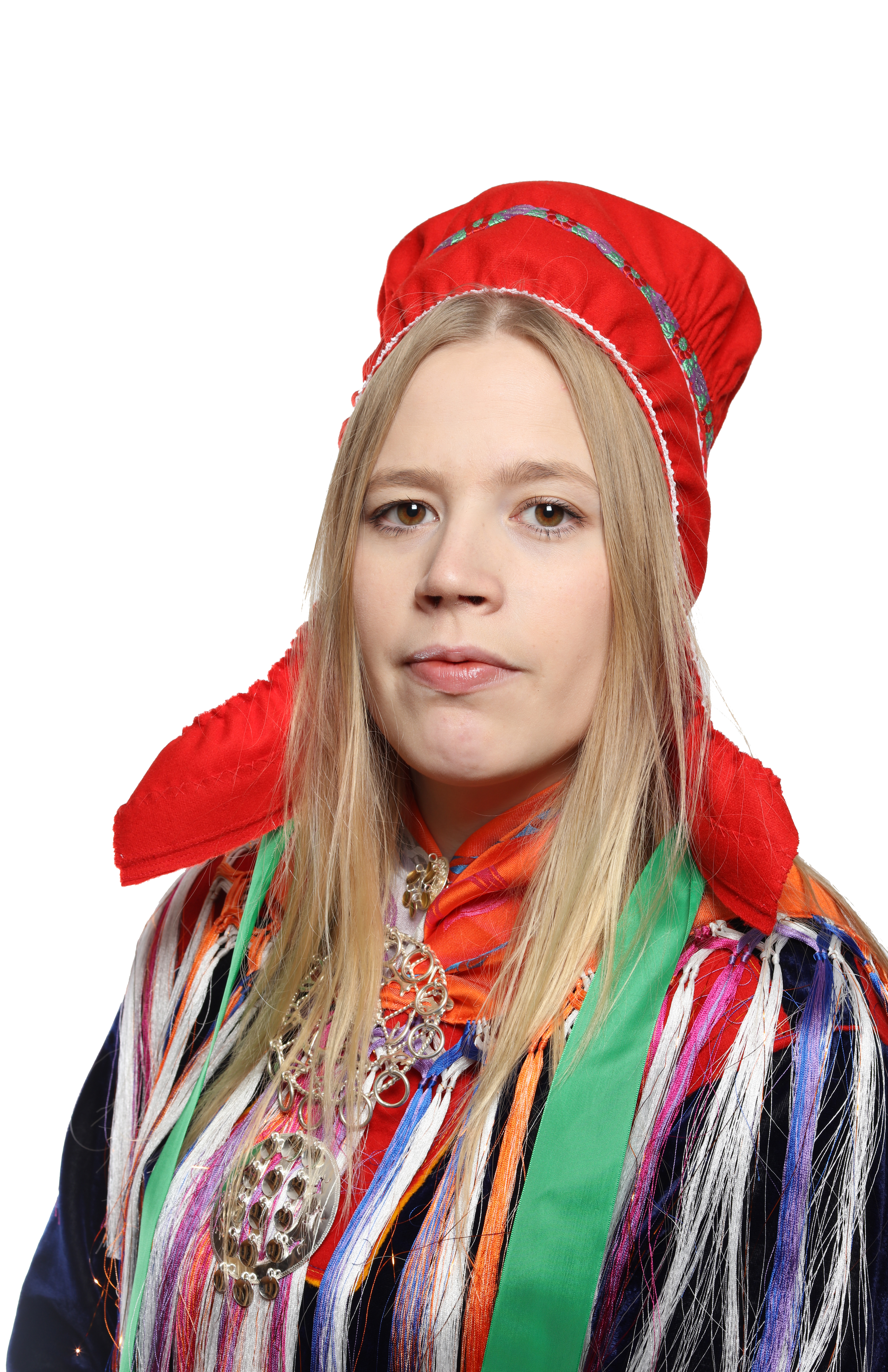 Marja Liissa Partapuoli Foto: Kenneth Hætta